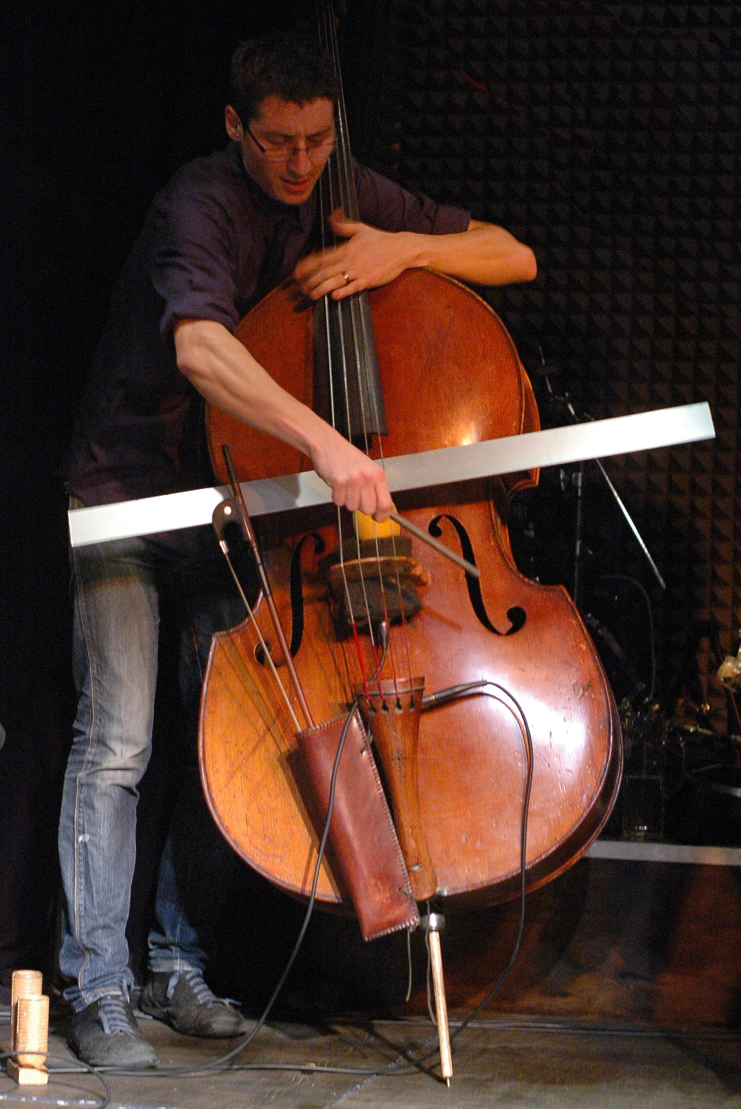 Clayton Thomas c/o Peter Brötzmann & friends im Schlot, Berlin, Germany Peter Brötzmann (reeds), Mats Gustafsson (reeds), Ken Vandermark (reeds), Conrad Bauer (tb), Johannes Bauer (tb), Marino Pliakas (e-b), Clayton Thomas (b), Michael Wertmüller (dr) Party parallel zum Jazzfest, in Kooperation mit jazzwerkstatt-berlin-brandenburg e.V. und Ulli Blobel